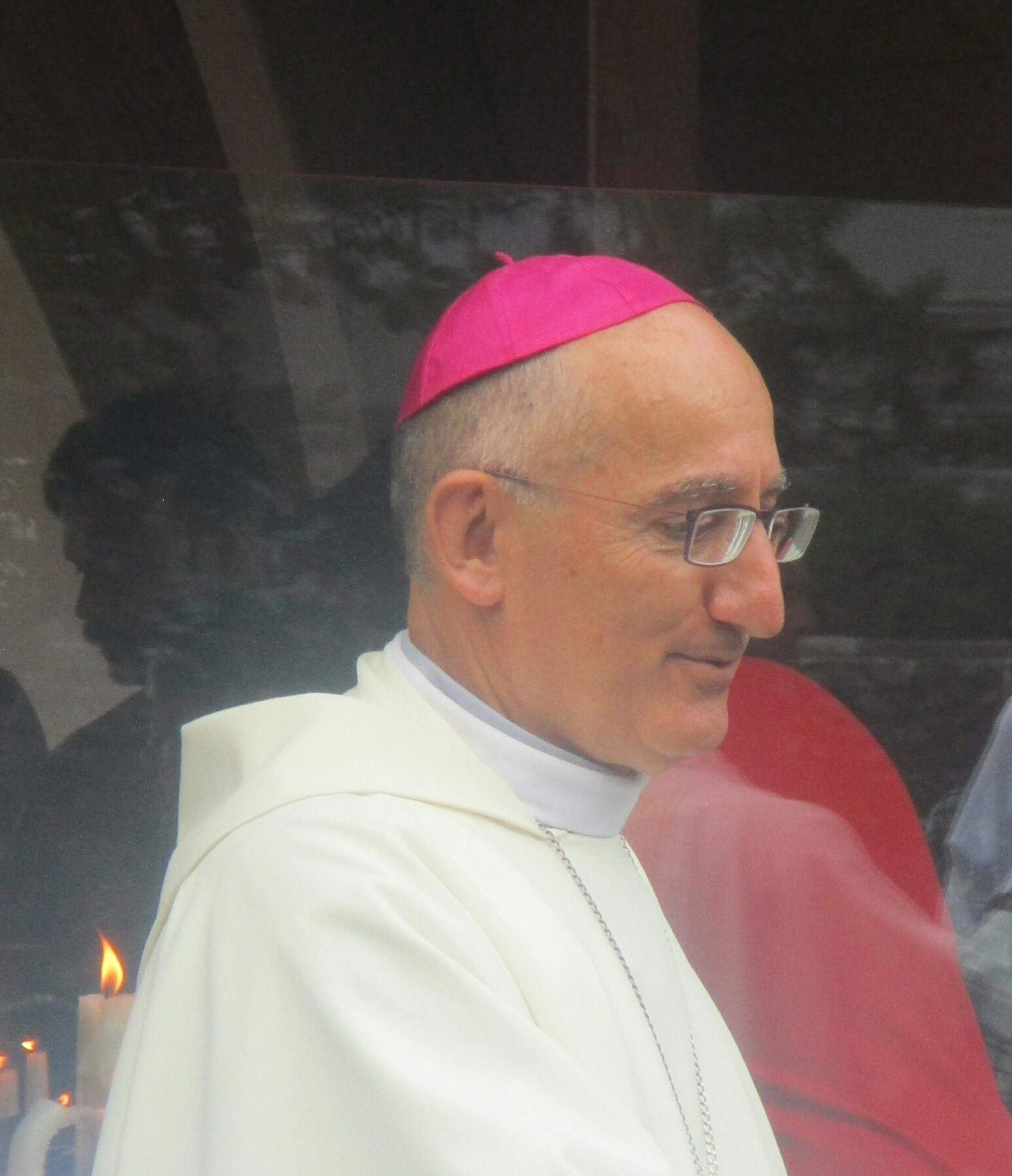 Mgr Giraud en août 2019.